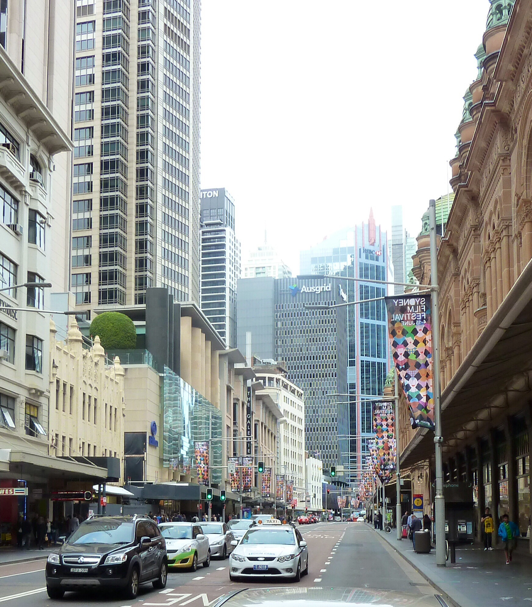 Midtown